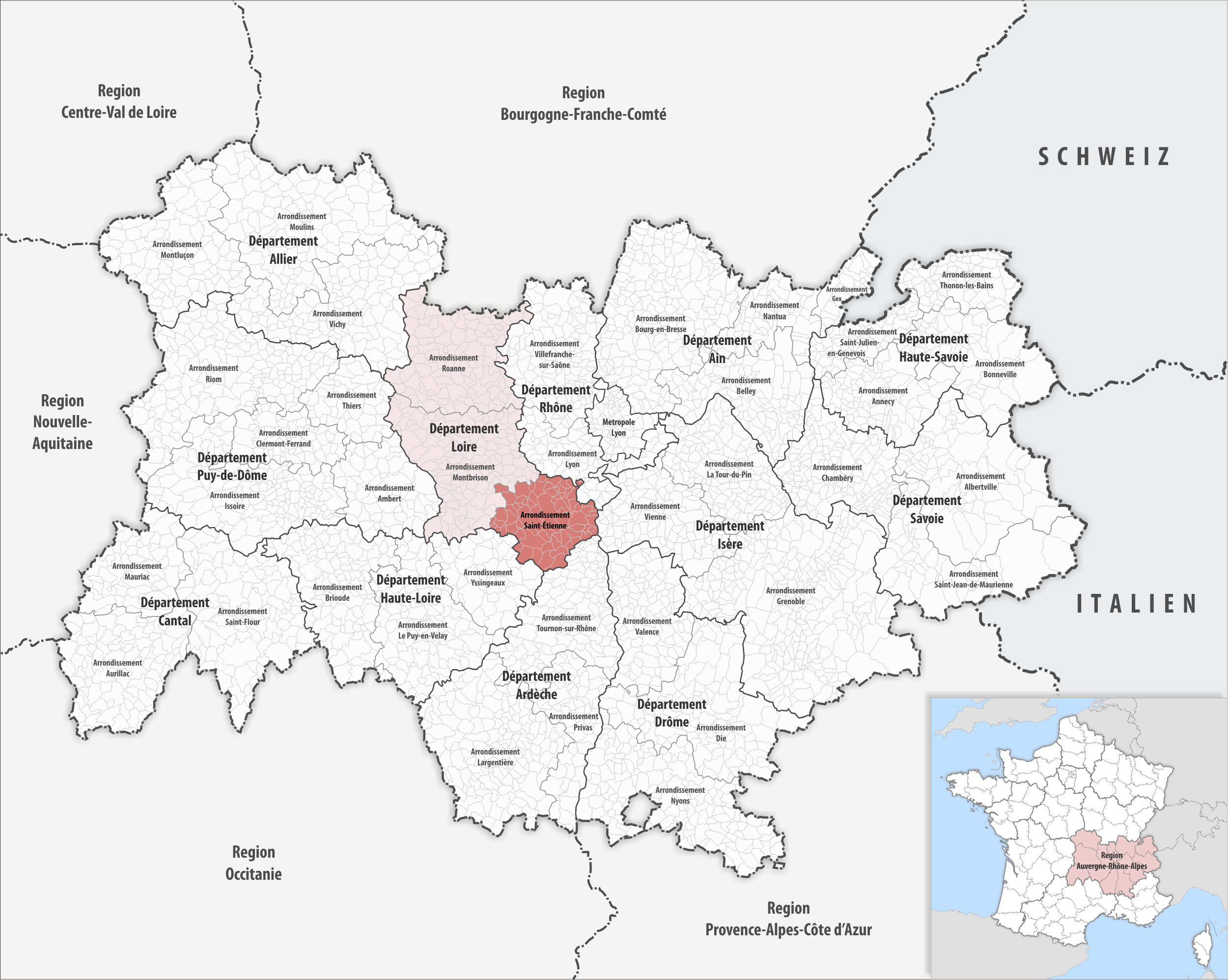 Lage des Arrondissements Saint-Étienne